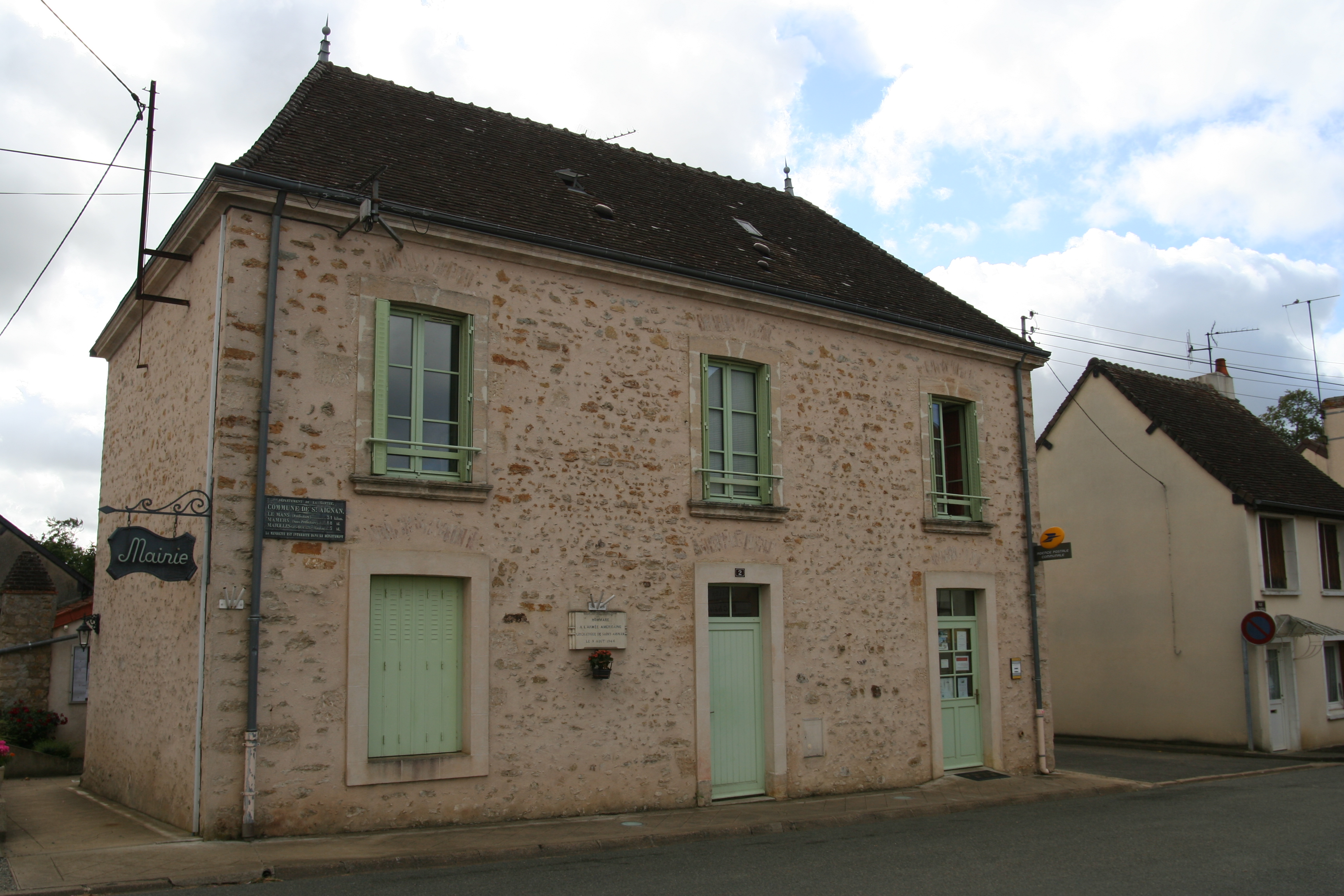 La mairie de Saint-Aignan.